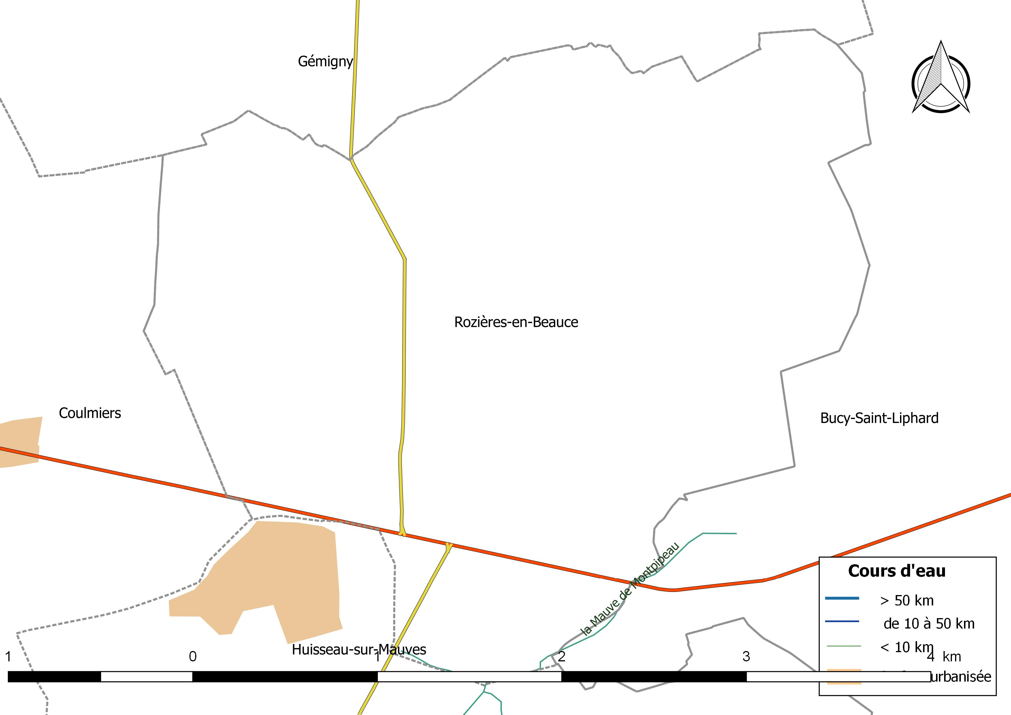 Carte du réseau hydrographique de la commune de Rozières-en-Beauce (France).